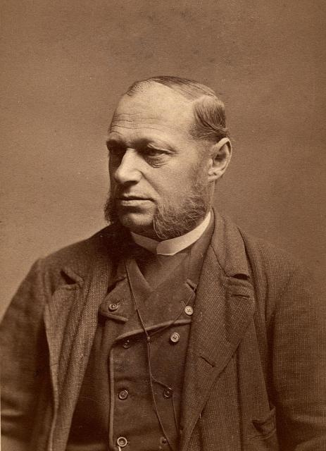 Ignác Šechtl (1840 - 1911), Český fotograf.